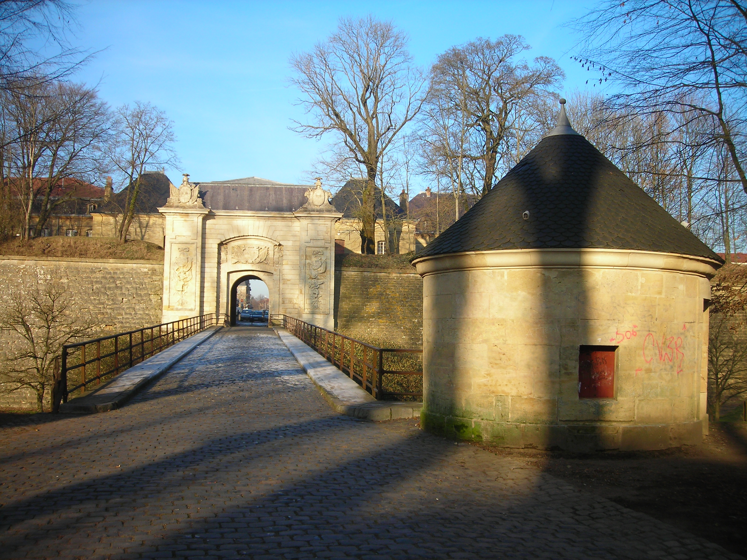 Vue sur la porte de France à Longwy, reste de la fortification qui entoure la ville haute.